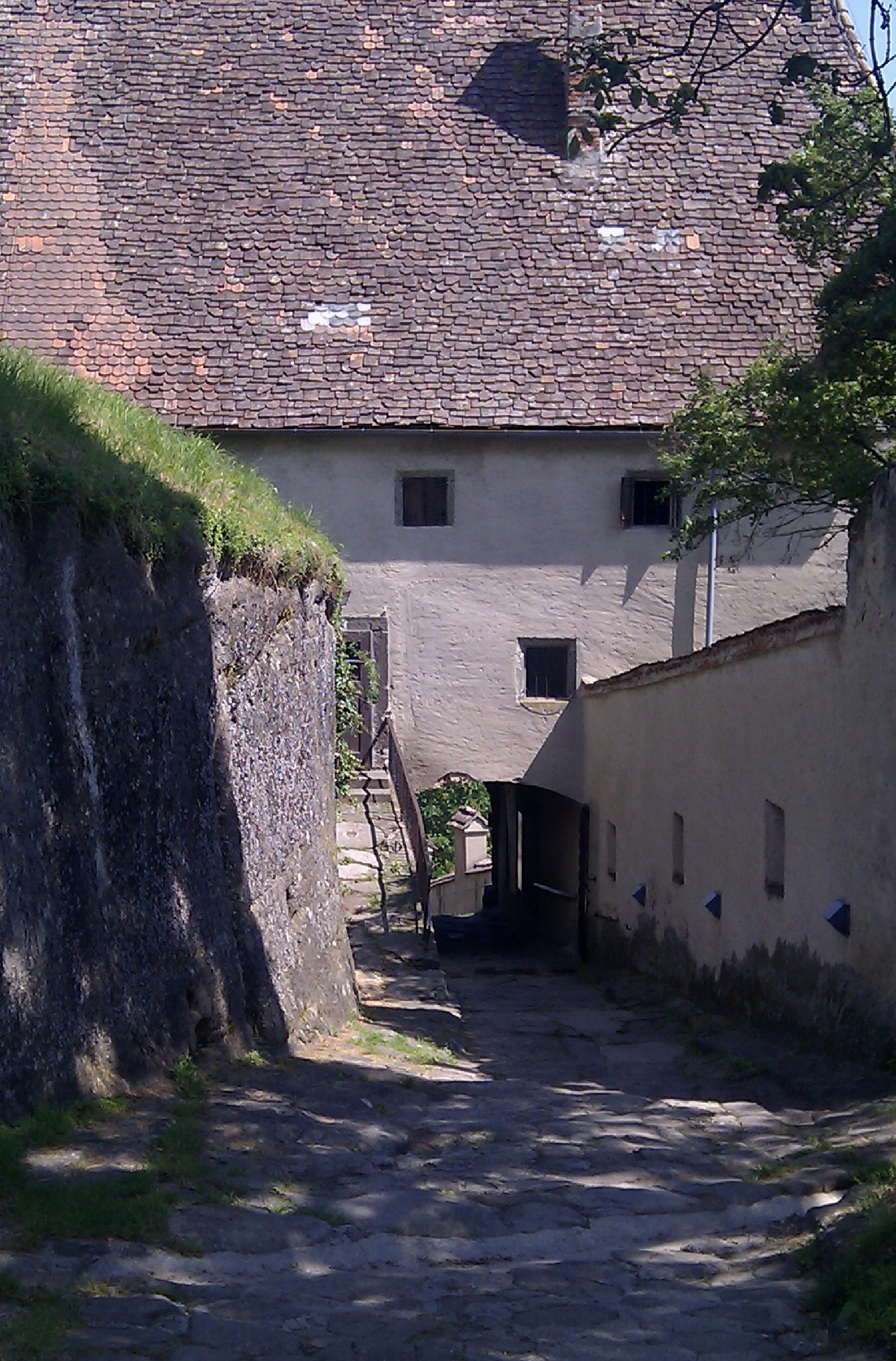 Cilli-Tor, Riegersburg, Steiermark